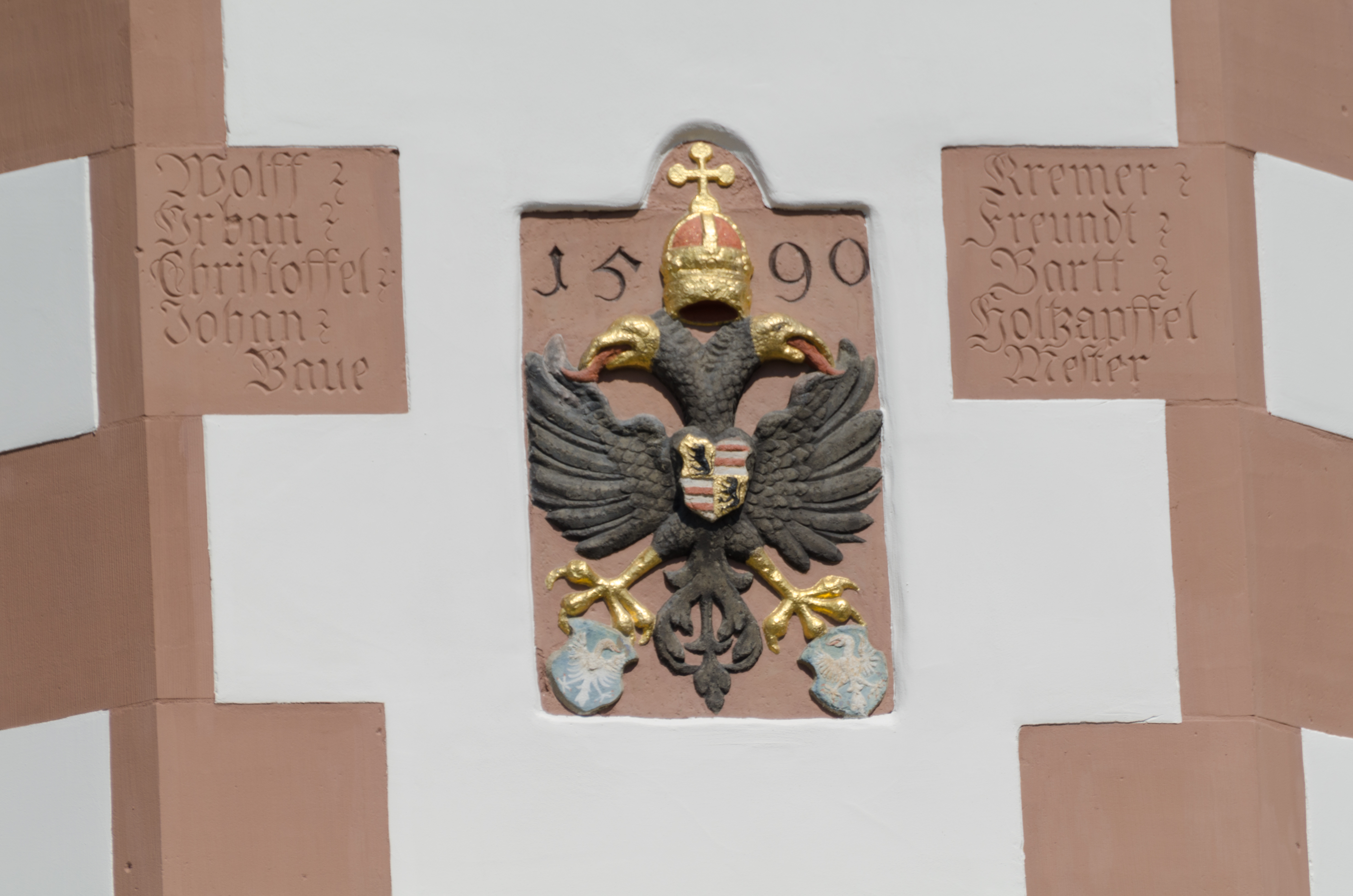 Schweinfurt, Zeughaus